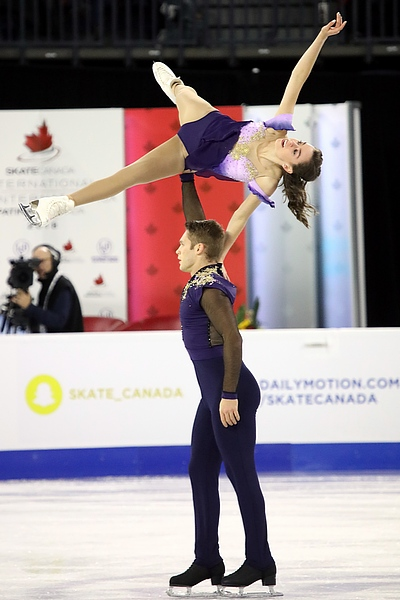 Эвелин Уолш и Треннт Мишо на этапе Гран-при Skate Canada 2018